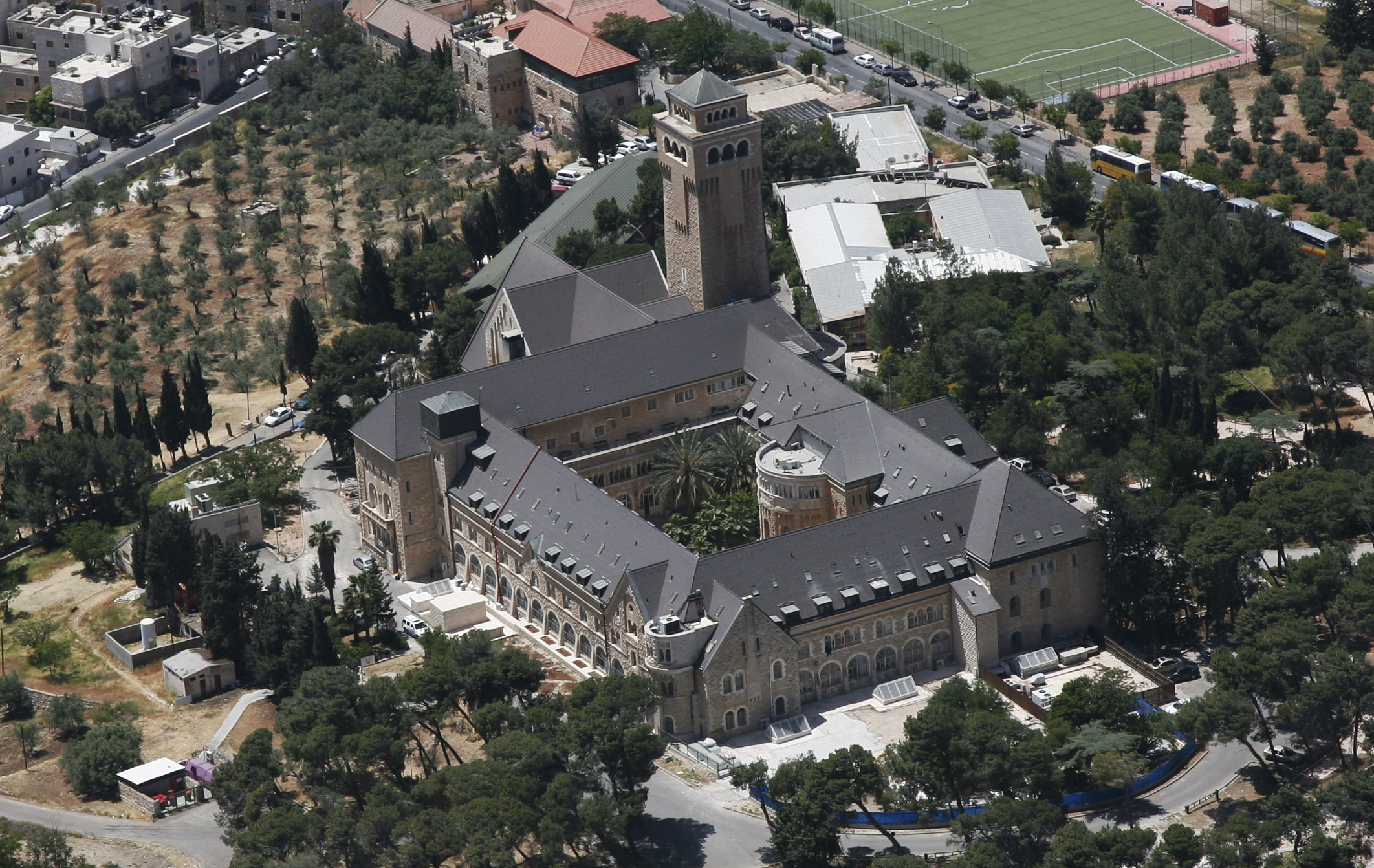 מתחם אַוּגוּסְטֶה ויקטוֹריה משתרע על שטח של כ-80 דונם בפסגת הר הזיתים בירושלים. נקרא על שם אוגוסטה ויקטוריה משלזוויג הולשטיין, אשתו של מקים המתחם, וילהלם השני, קיסר גרמניה. במתחם כנסייה עם מגדל פעמונים, וכן אכסניית צליינים. כיום משמש כבית חולים, ובמזרחו ממוקם "המכון הגרמני הפרוטסטנטי לארכאולוגיה בארץ הקודש".להיכנס